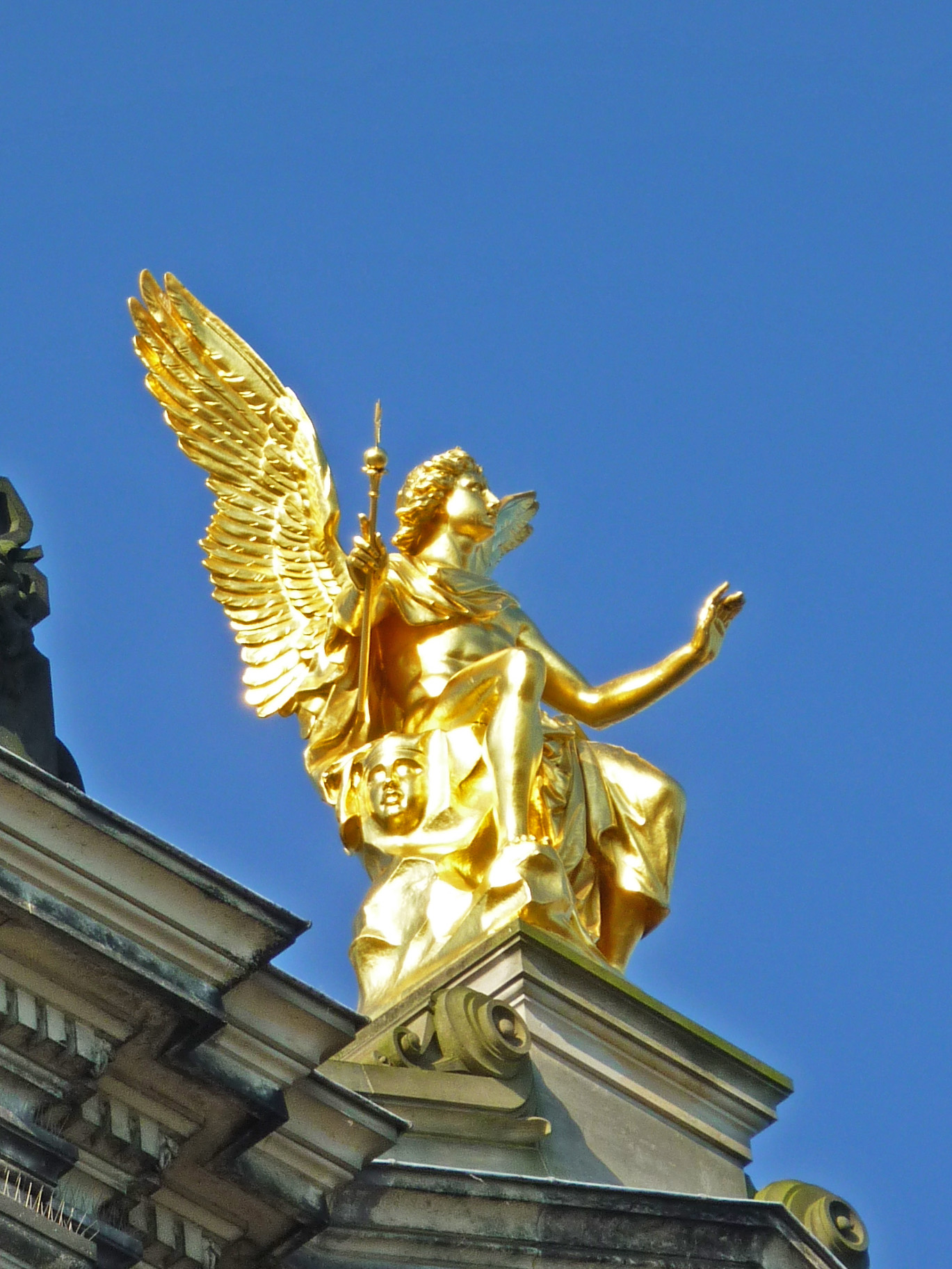 Phantasos auf dem westlichen Eckrisalit der Kunstakademie Dresden von Robert Henze